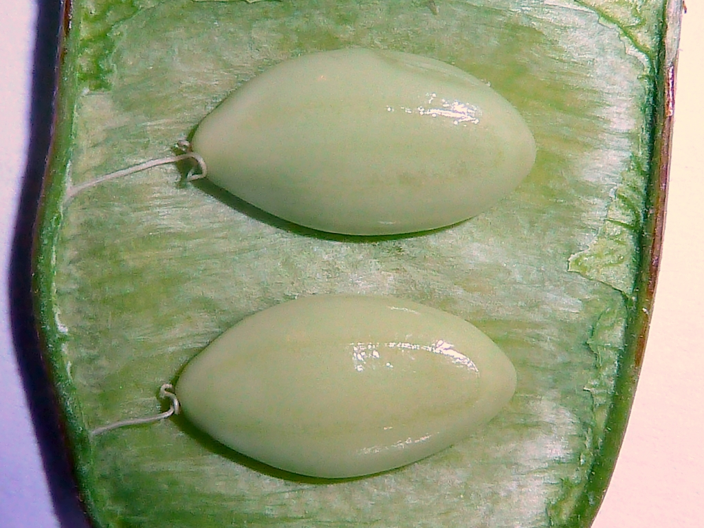 Albizia julibrissin (Acacia de Constantinopla) : Semillas inmaduras in situ, con su funículo - Ornamental, Plaza de Felipe II, Madrid (España).